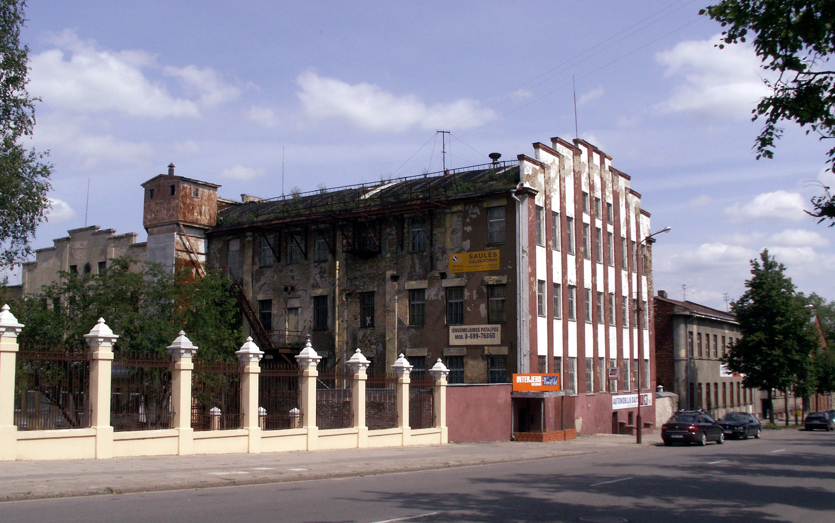 Frenkelio fabrikas Šiauliuose